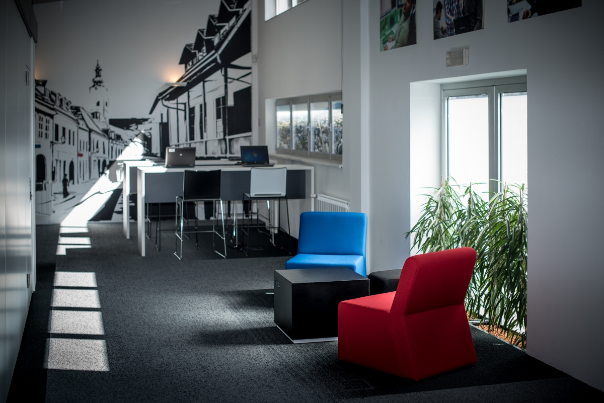 interijer